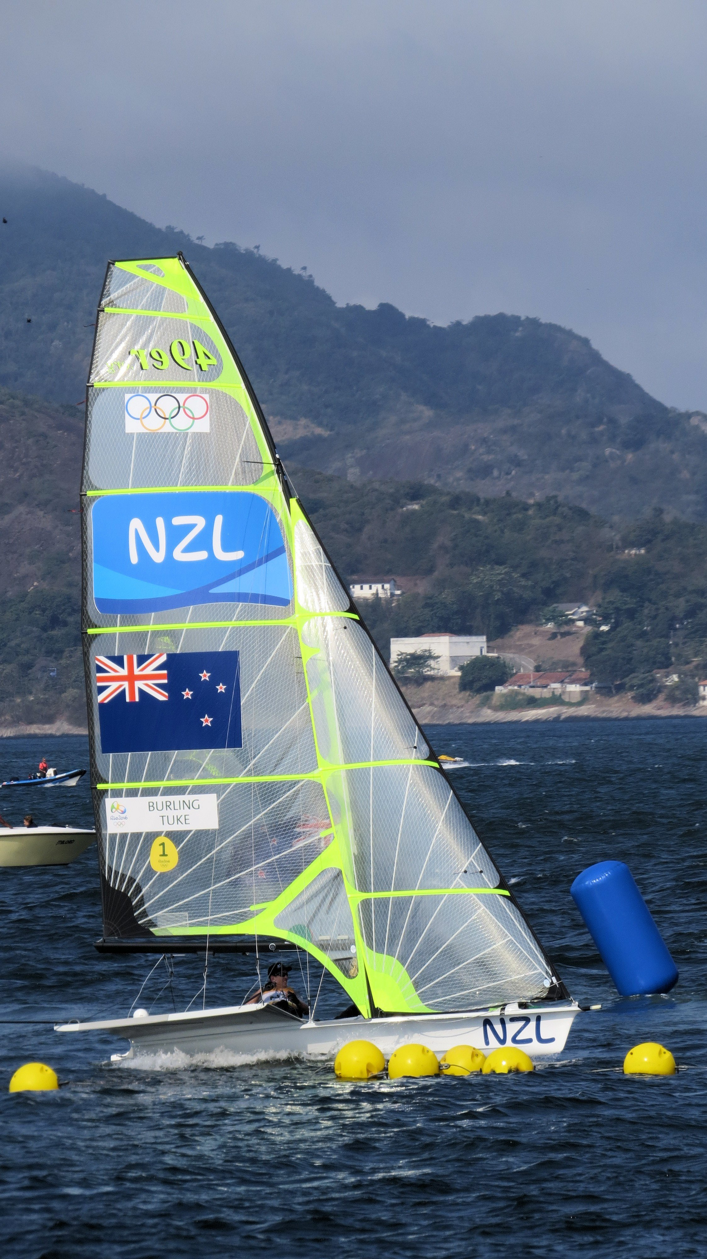 sx50